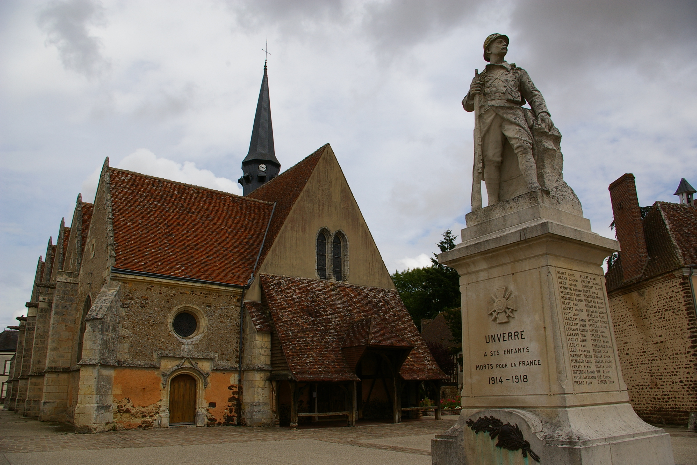 place de l'église Saint-Martin d'Unverre avec au premier plan le monument aux morts réalisé par Félix Charpentier, Eure-et-Loir (France).